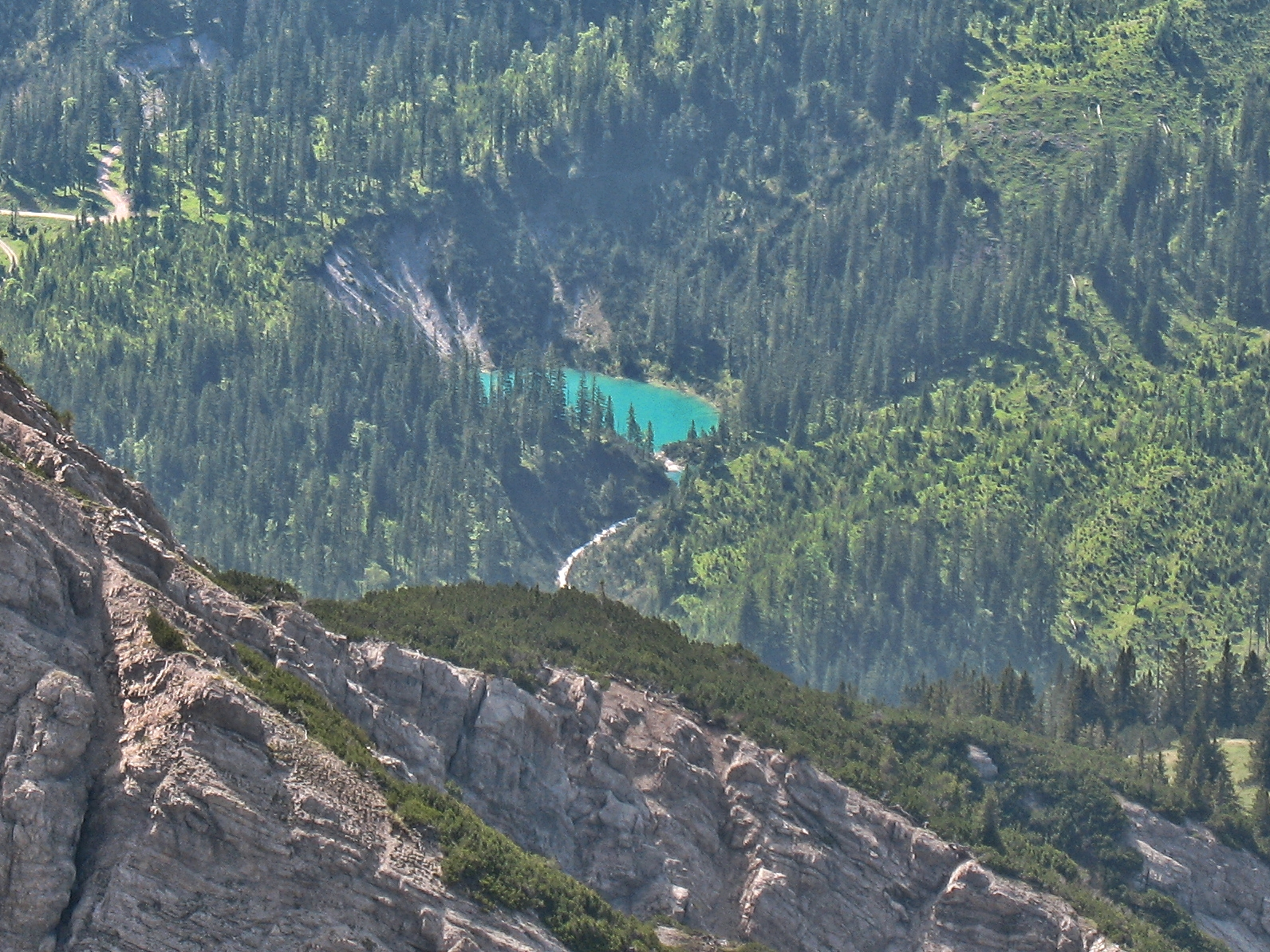 Blick vom Kastenkopf (2129 m) nach Südosten hinab zum Sieglsee (1205 m).